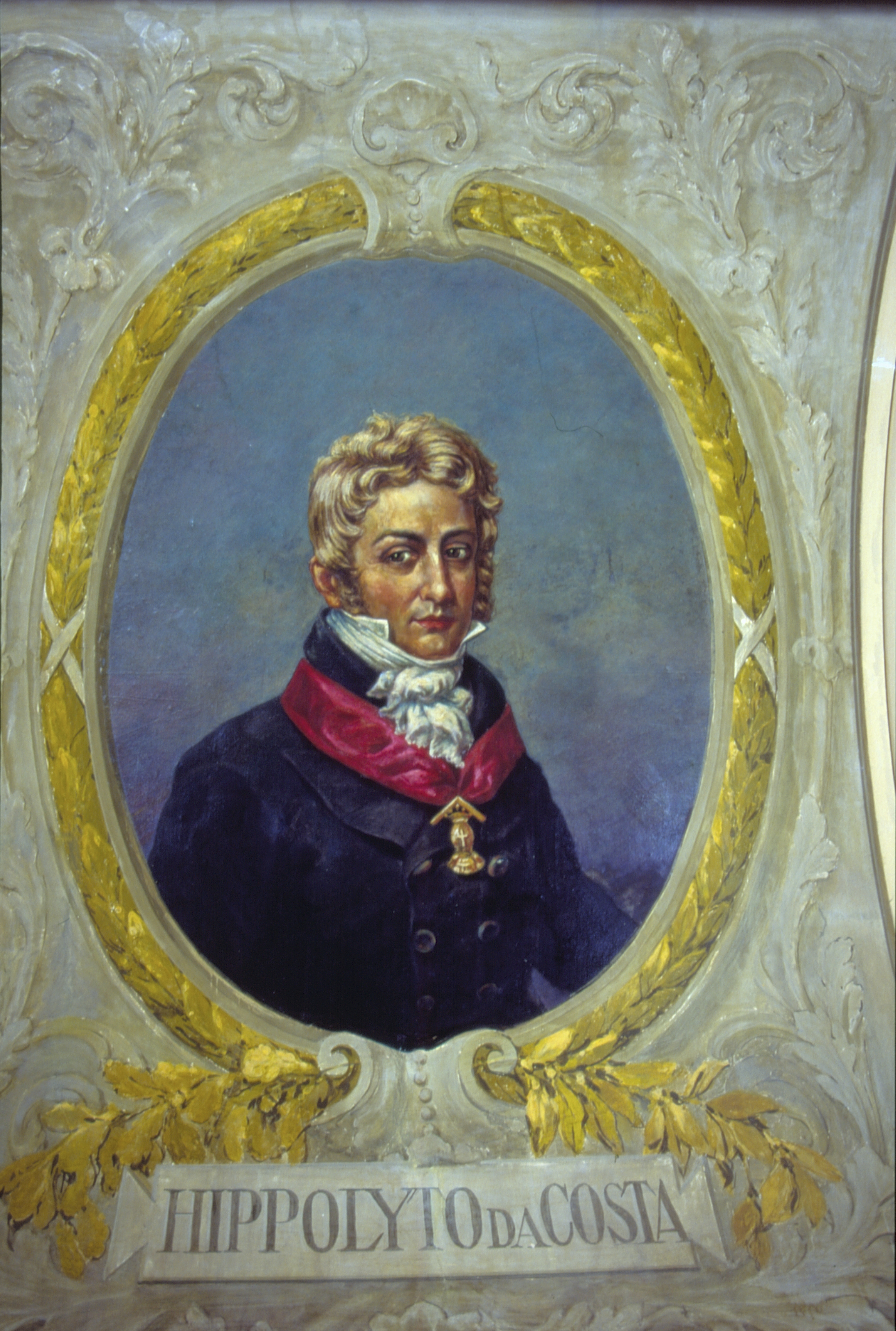 Obra que integra o acervo do Museu Paulista da USP. Coleção Fundo Museu Paulista - FMP